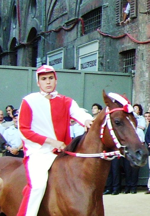 15th August trial Palio di Siena - Giovanni Atzeni